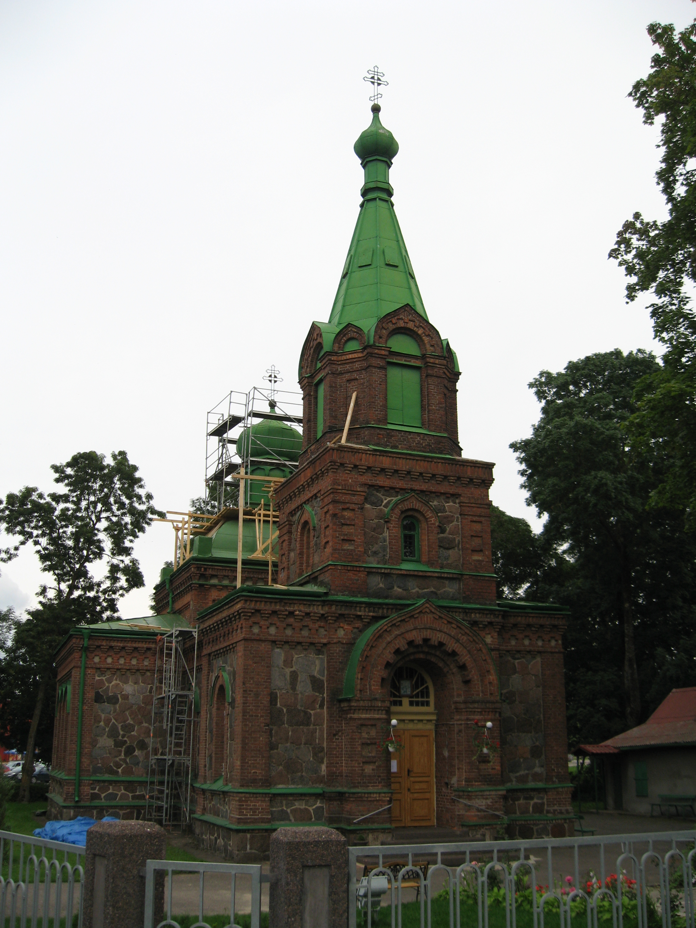 Православная церковь в городе Йыхви